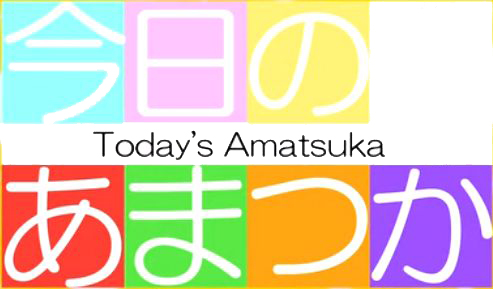 今日のあまつかロゴ